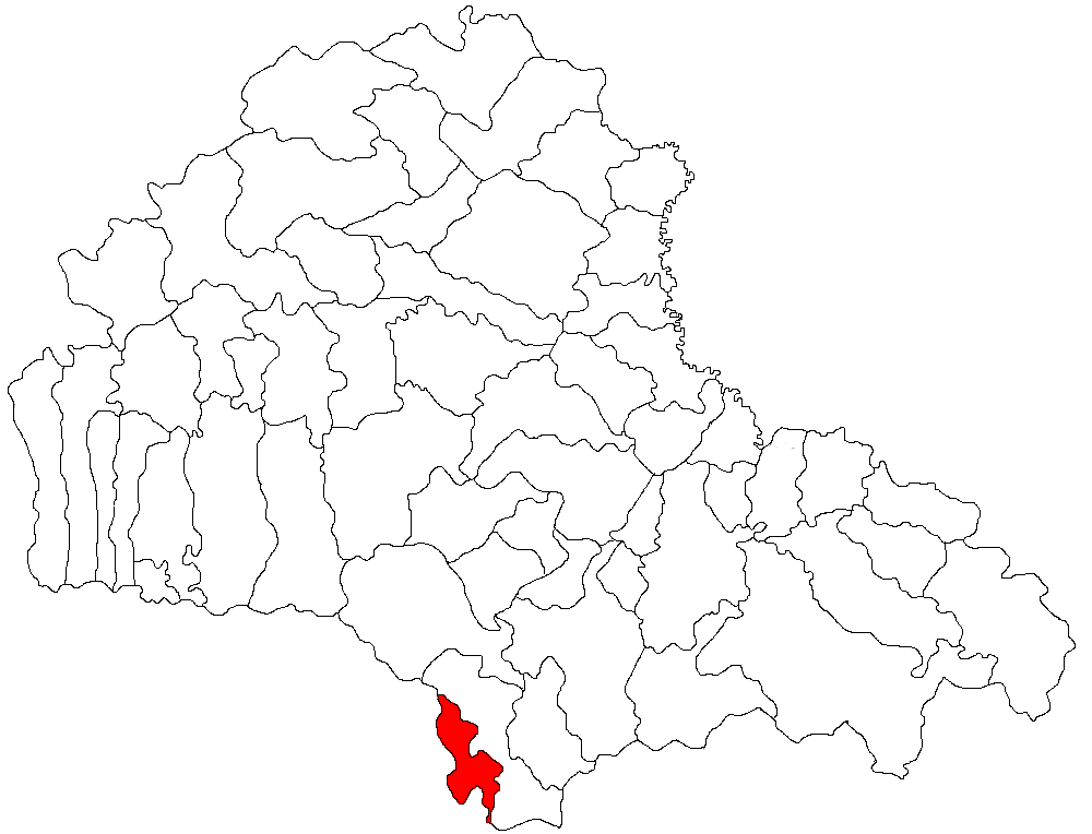 Categorie:Hărţi ale judeţului Braşov